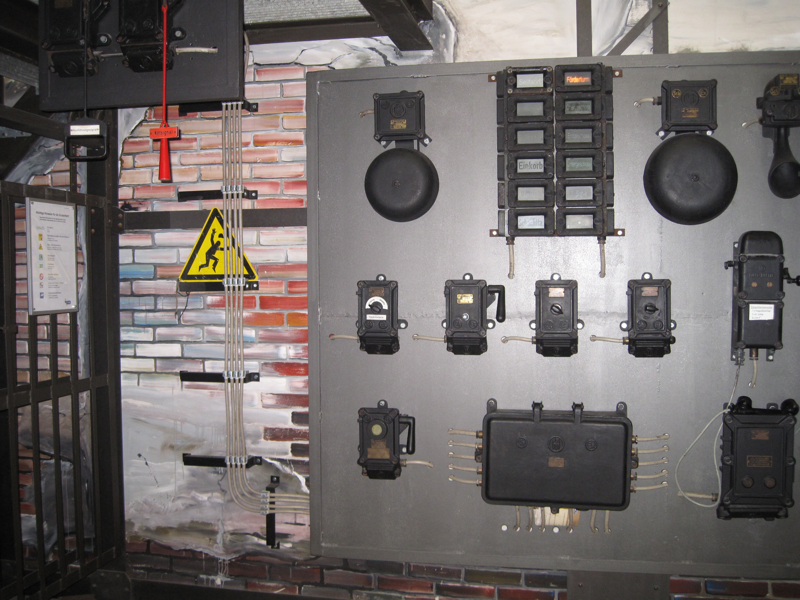 Deutsches Bergbau-Museum Bochum in Bochum.